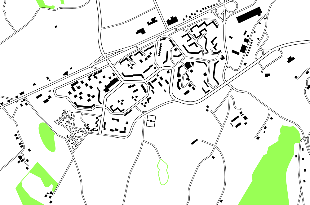 Plan du quartier de Planoise à Besançon réalisé à partir des cadastres de 1977.